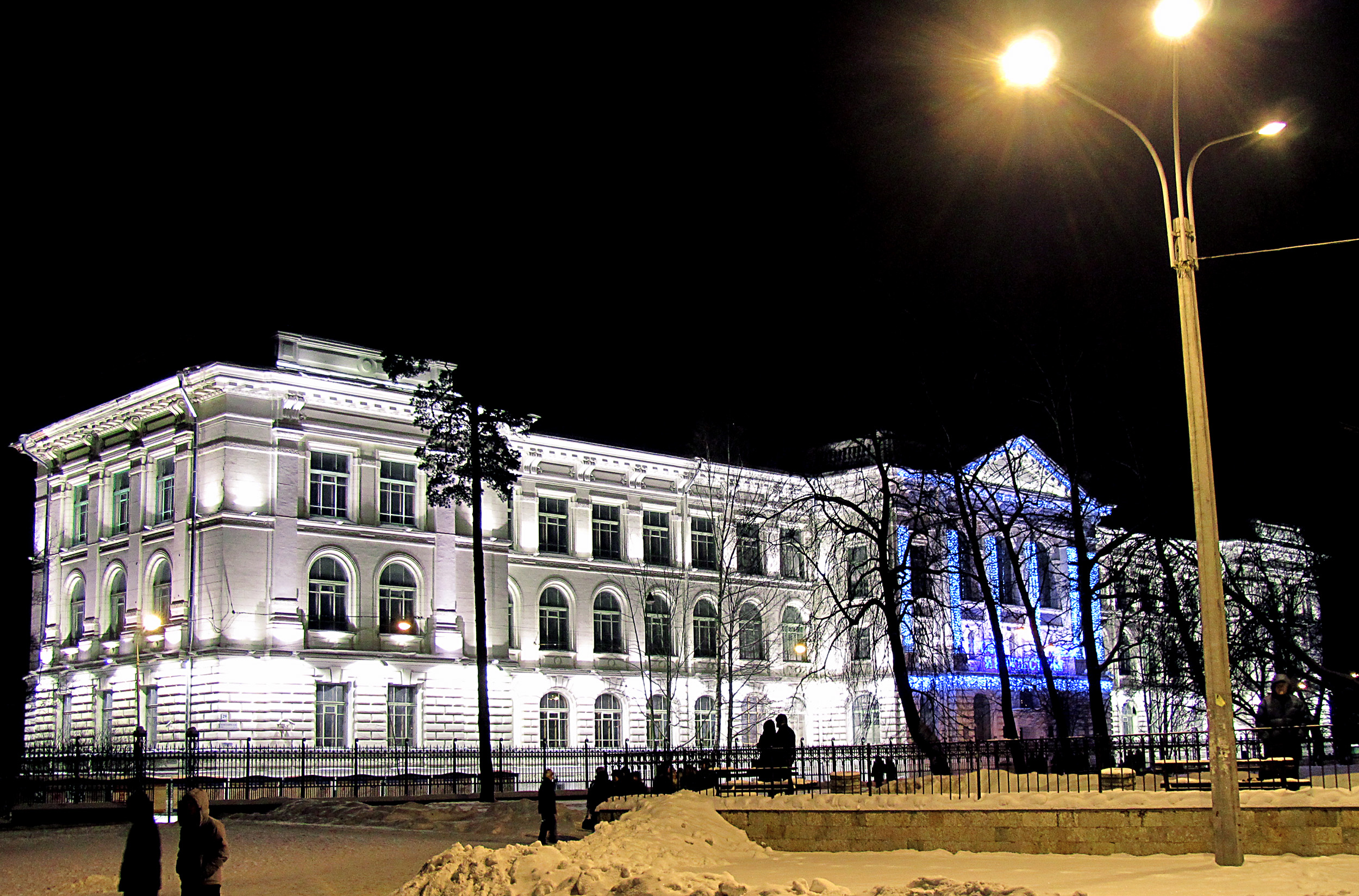 Политехническая ул., 29 1899-1903 гг., арх. Виррих Э. Ф., арх. Падлевский И. В. Главное здание института при ночном освещении зимой